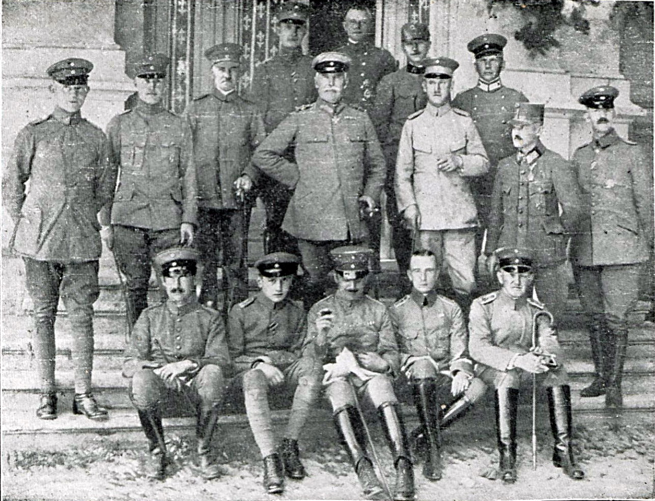 1916 - Album foto -Generalul von Eben si statul major al Armatei 9